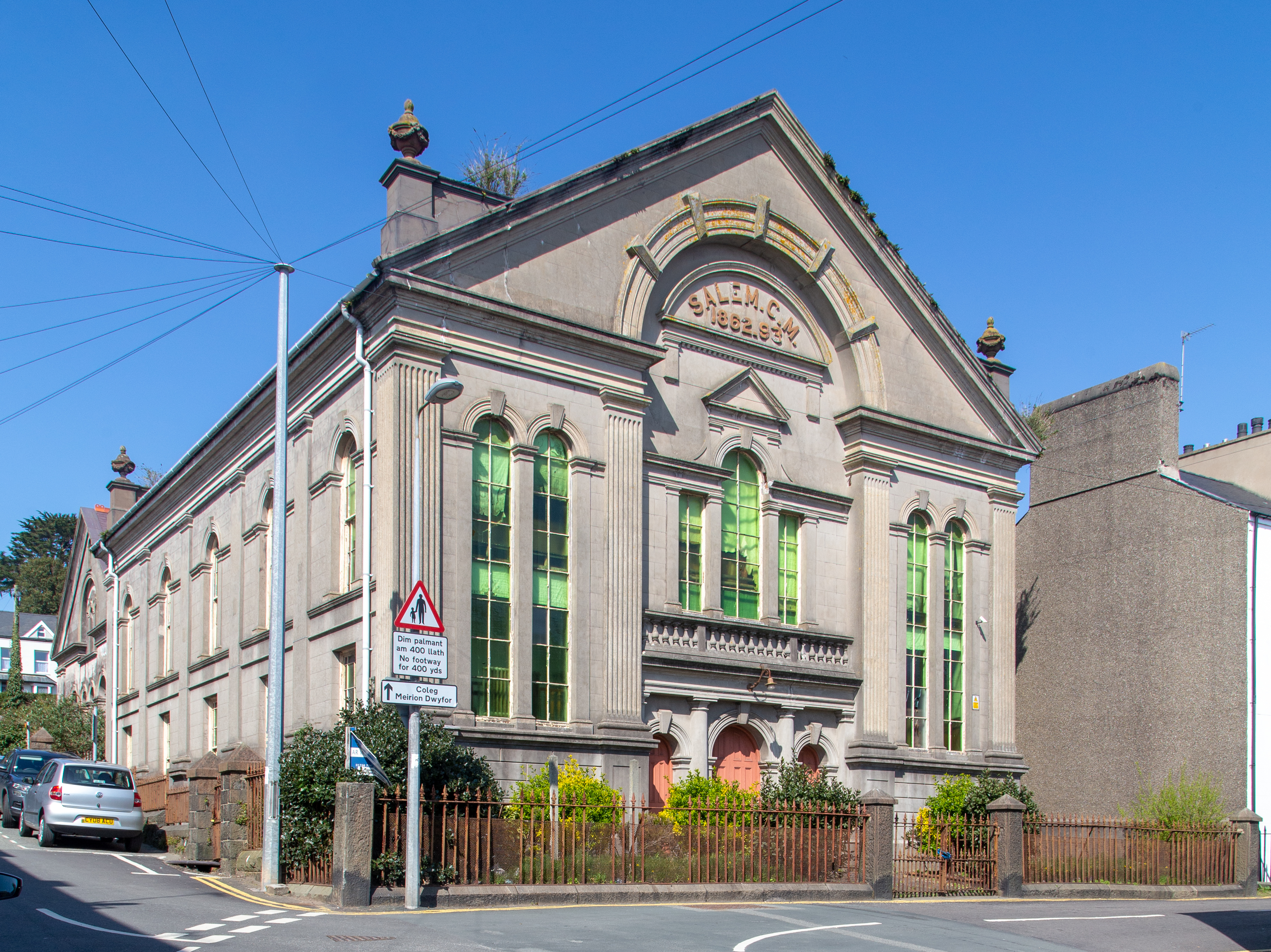 Capel Salem, Pwllheli